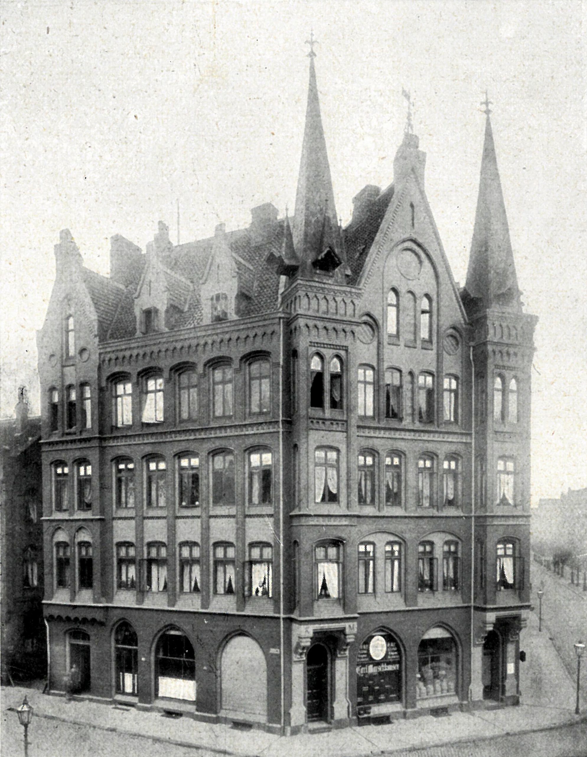 Das 1875 von dem Architekten Christoph Hehl für seinen Kollegen August Strasser errichtete Haus Strasser an der Reitwallstraße (links) Ecke Goethestraße. Die anfängliche Adresse lautete zunächst Goethestraße 24. Die Aufnahme zeigt das Wohn- und Geschäftsgebäude unter der späteren Adresse Reitwallstraße 5b mit den Schaufenstern des Weinhandels mit angeschlossener Likörfabrik unter dem Firmen-Namen Karl Marschhausen ...